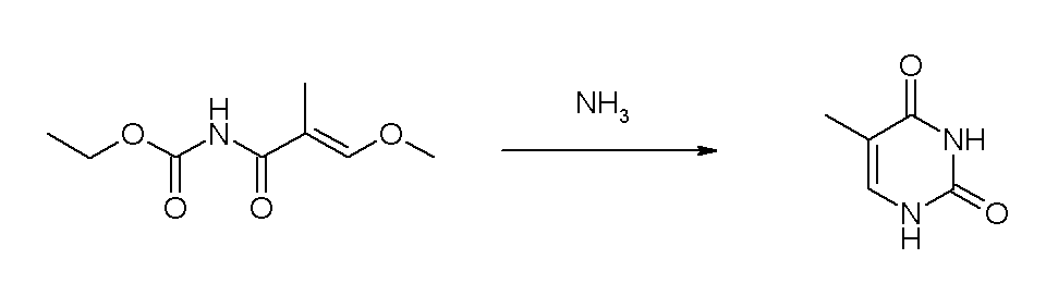 Synthese von Thymin